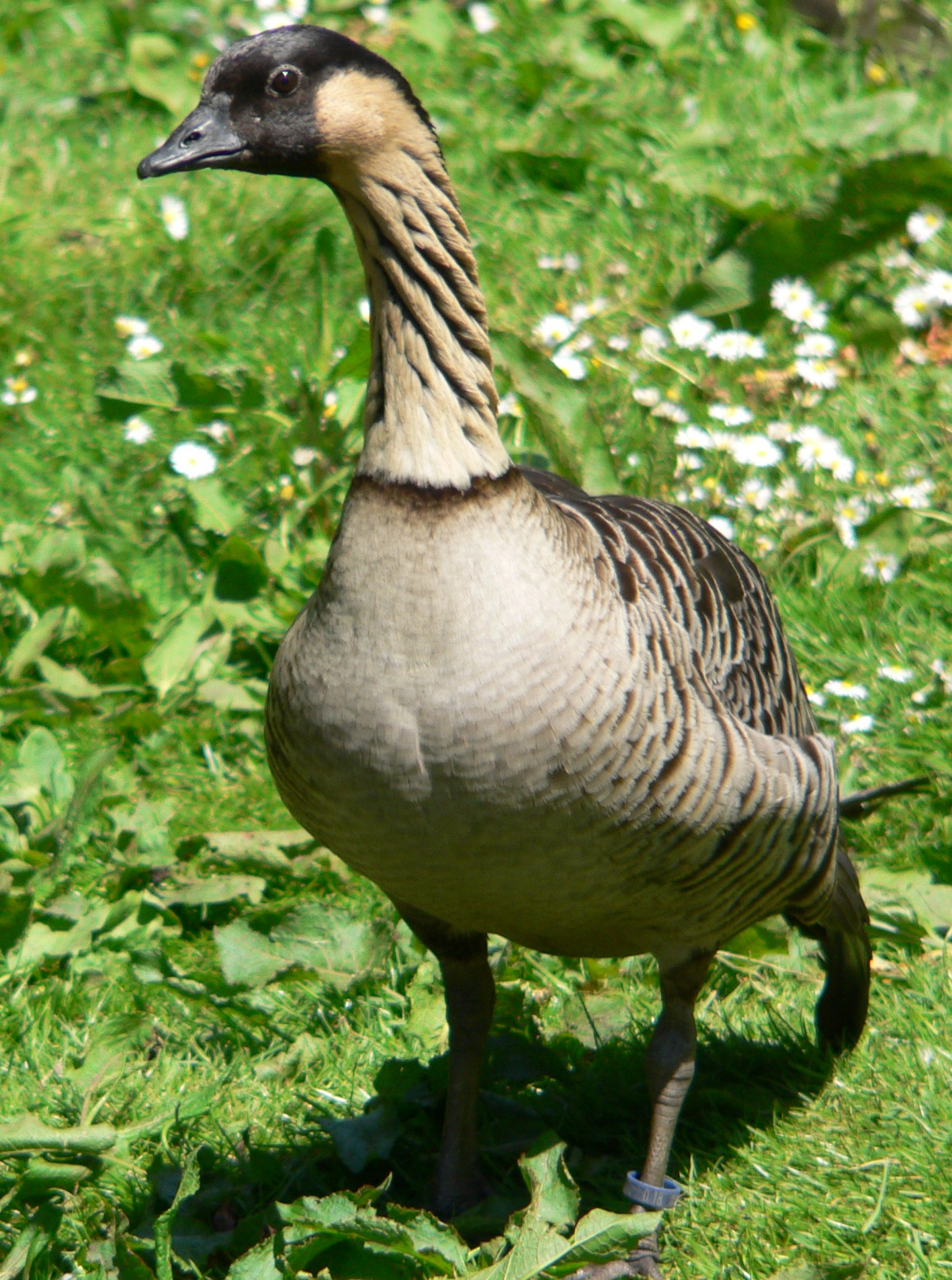 Branta sandvichensis